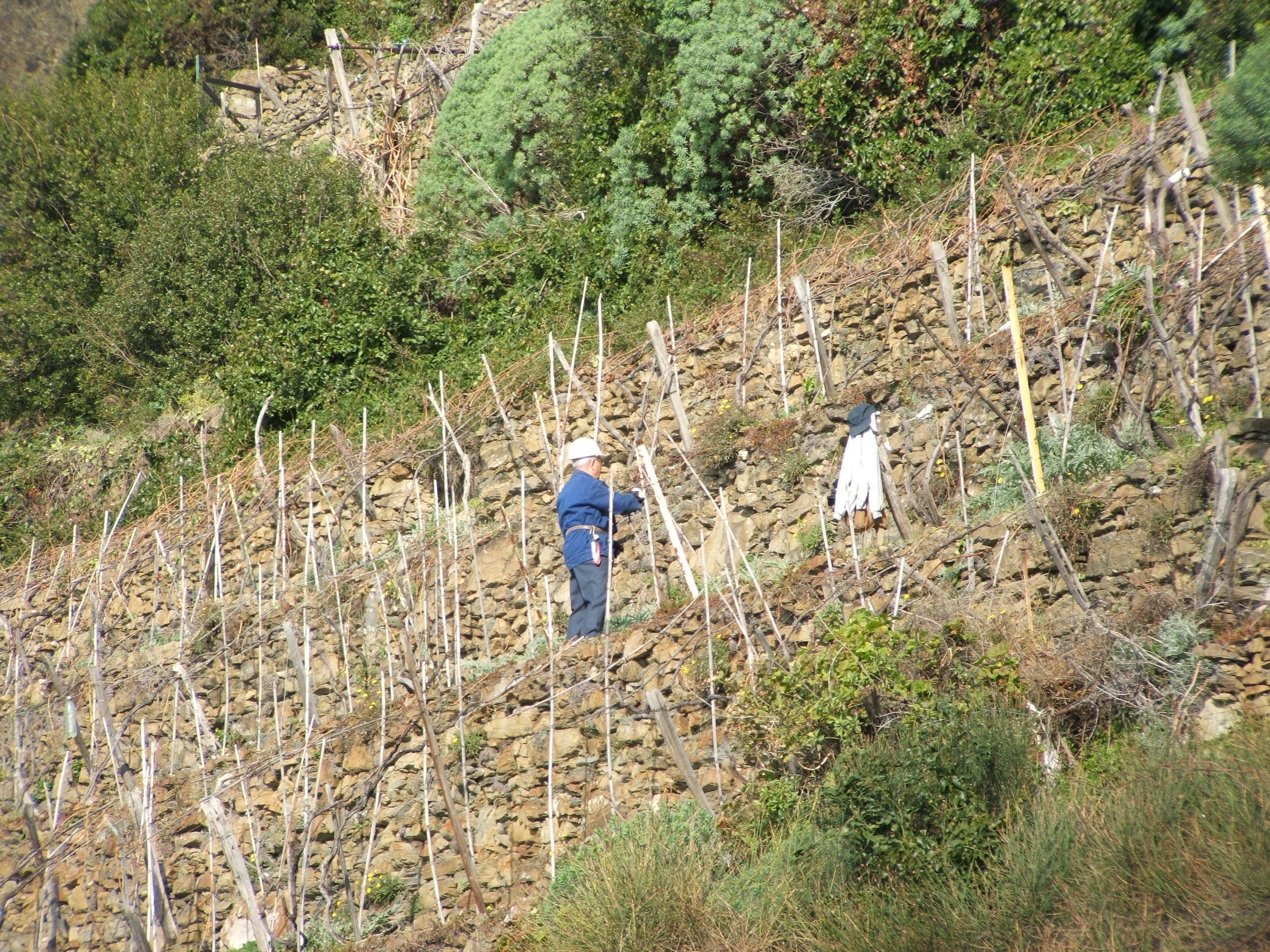 Immagine dalle Cinque Terre Contadino al lavoro a Manarola